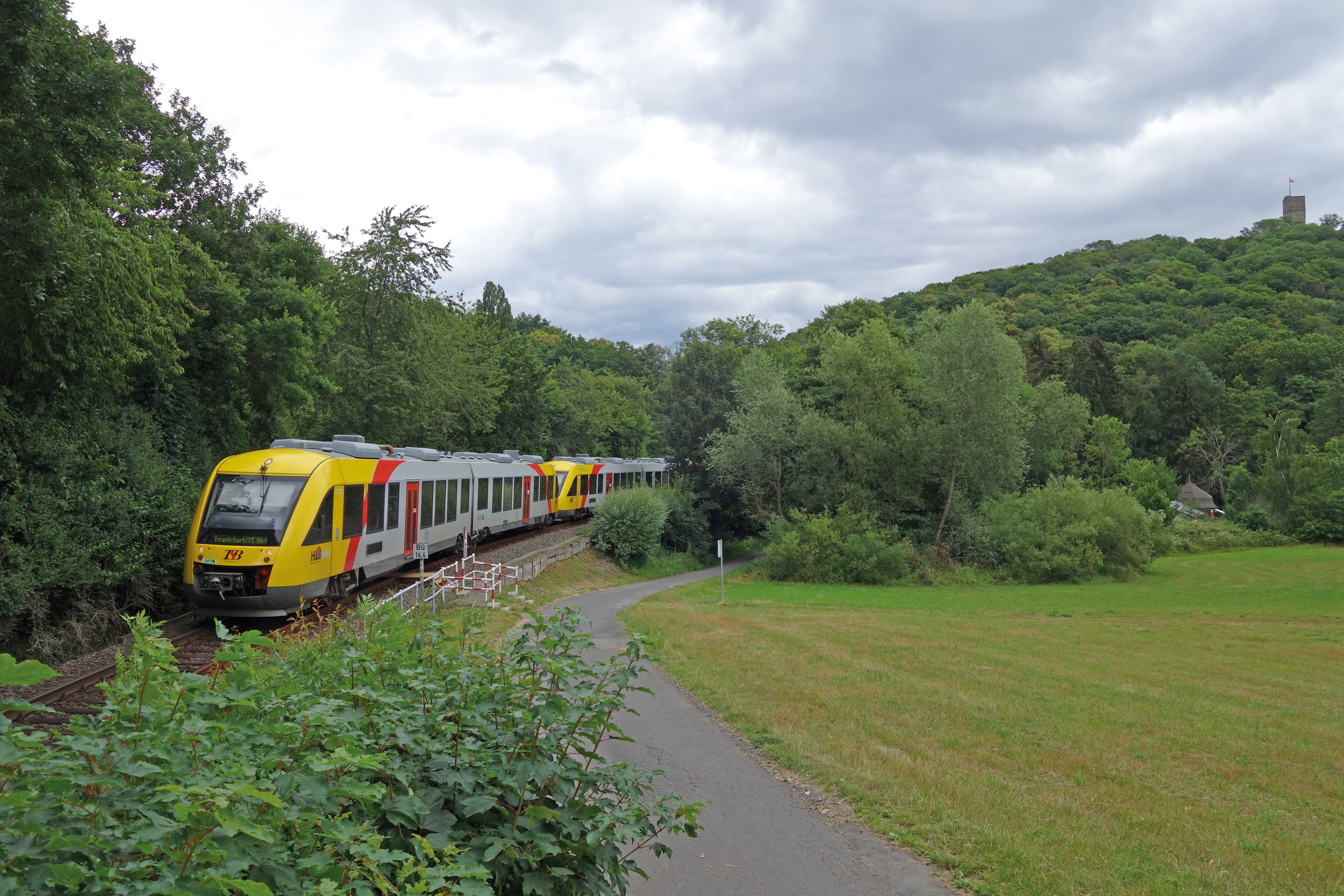 Triebwagen des Typs Alstom Coradia LINT 41 der Hessischen Landesbahn vor Burg Königstein auf der Frankfurt-Königsteiner Eisenbahn